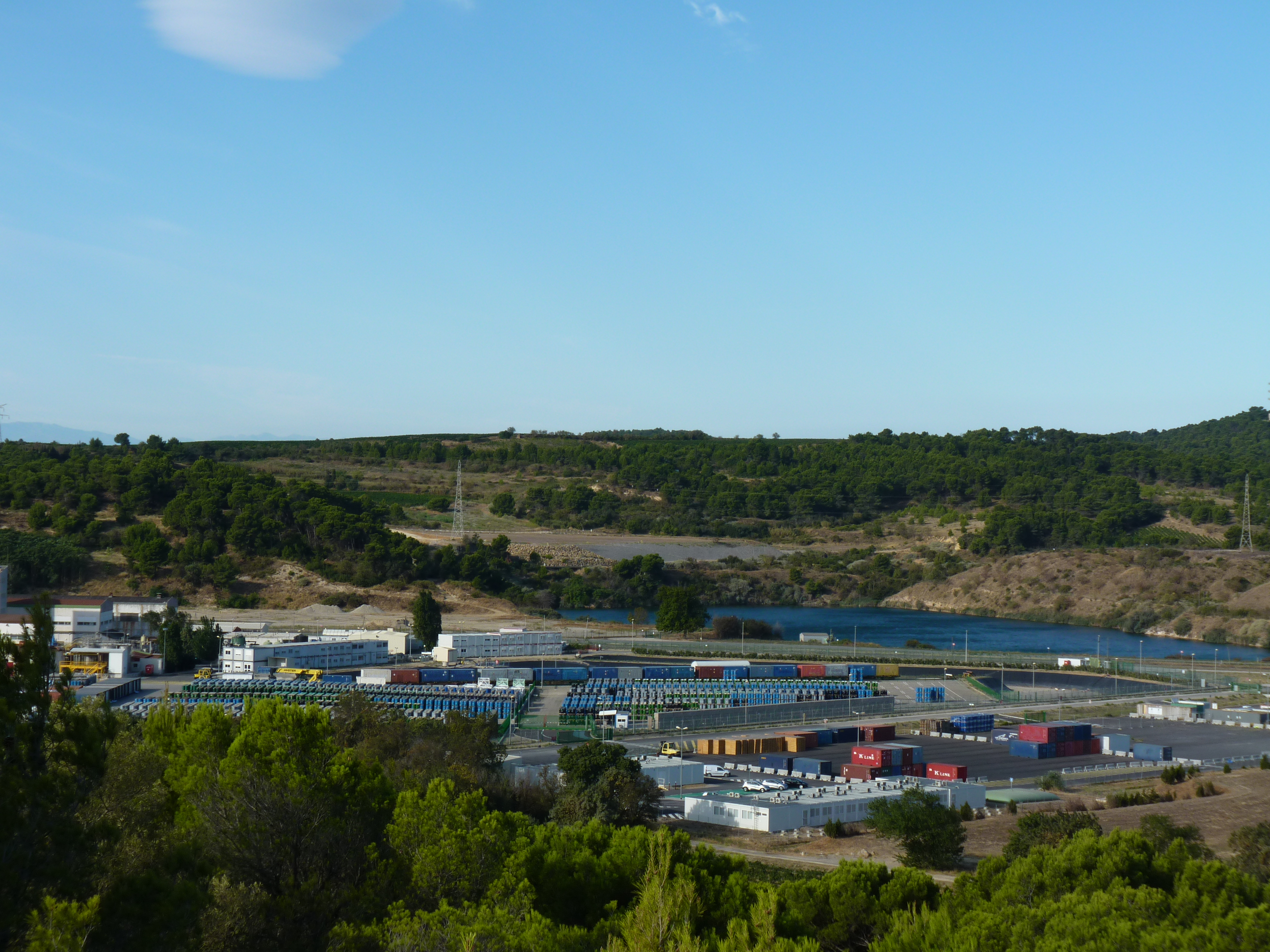 Entreposage de conteneurs (entre autre des concentrés d'uranium), sur la zone nord de l'usine Orano Malvesi. Vue sur la «zone de vie» et l'entrée nord